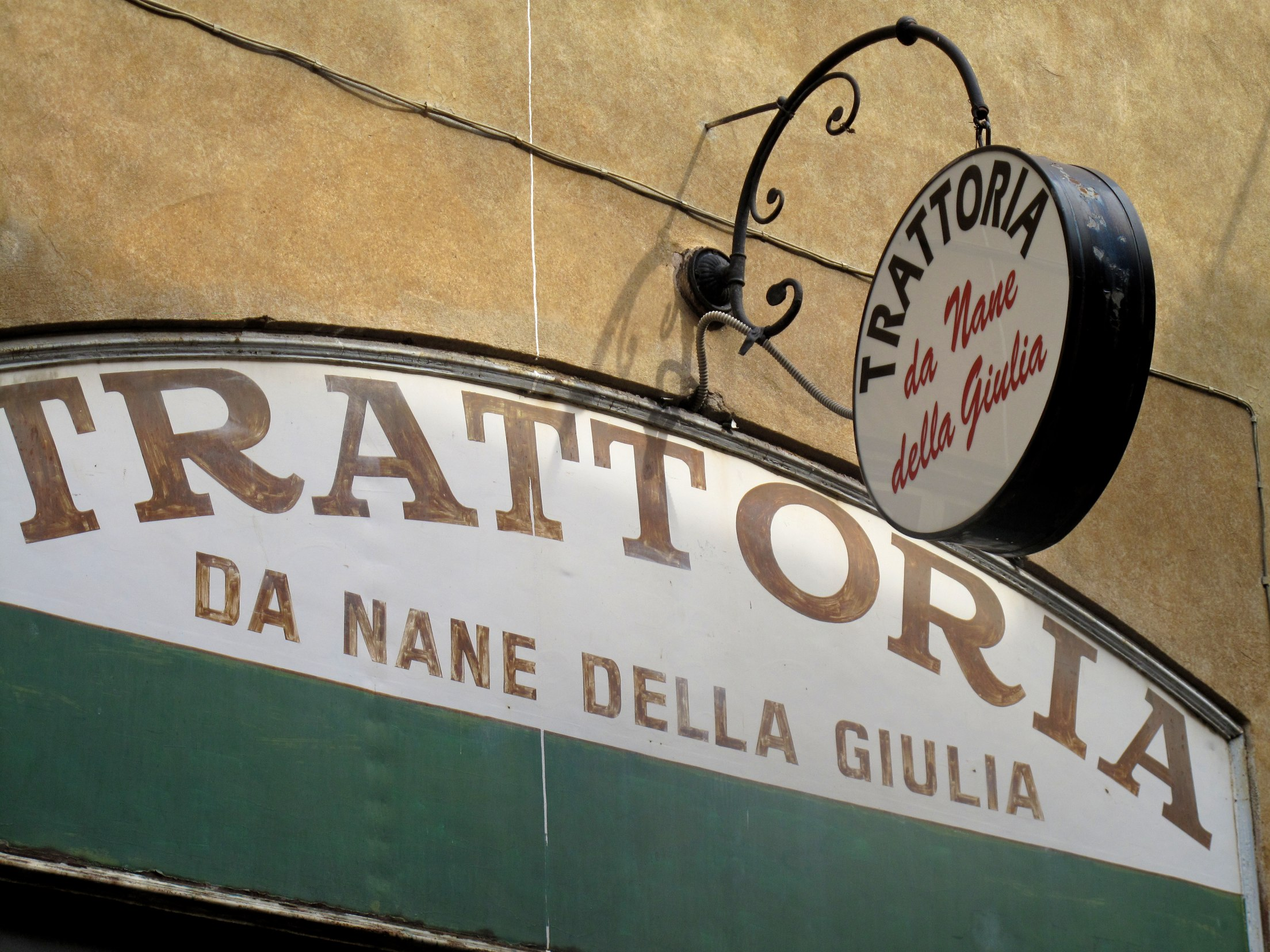 Padova juil 09 121